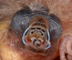 Rachenaufnahme eines Jungvogels 09/2006